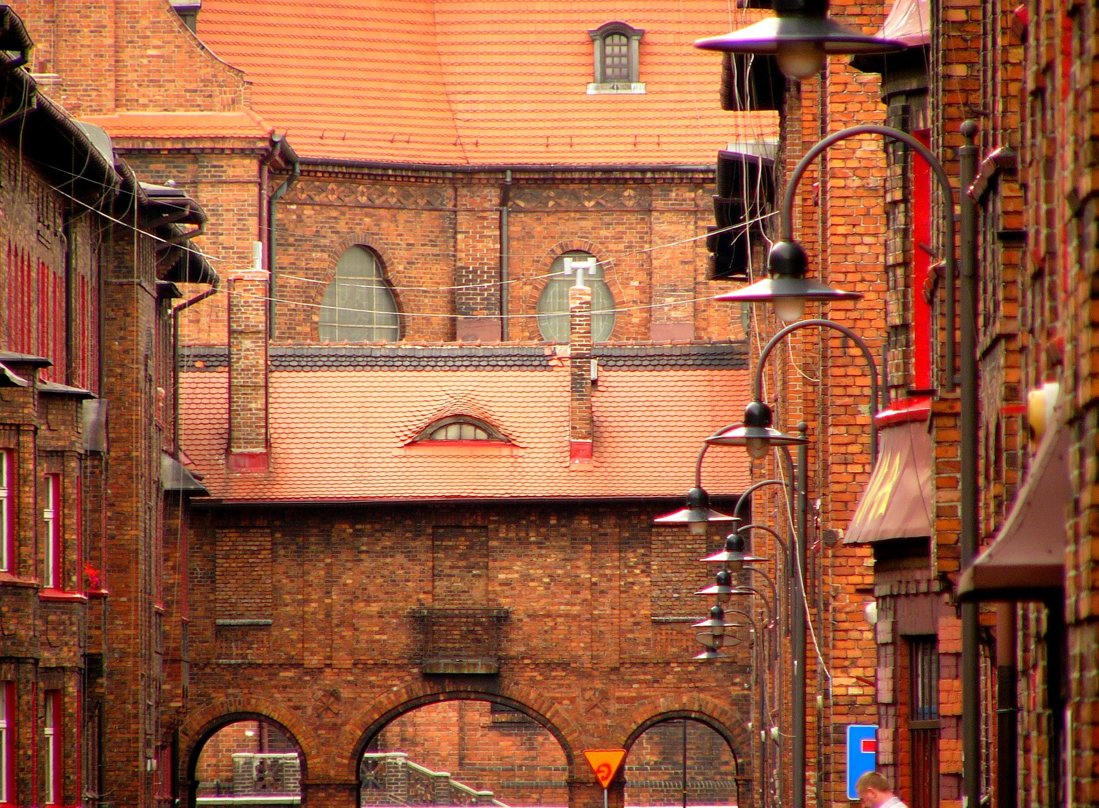 Osiedle robotnicze z lat 1908-1918, obejmujące ulice: księdza Ficka, Giszowiecka, Odrowążów, Czechowa, Janowska, świętej Anny, Garbarska, Rymarska, Nałkowskiej, Szopienicka, Plac Wyzwolenia Katowice, Nikiszowiec, Katowice